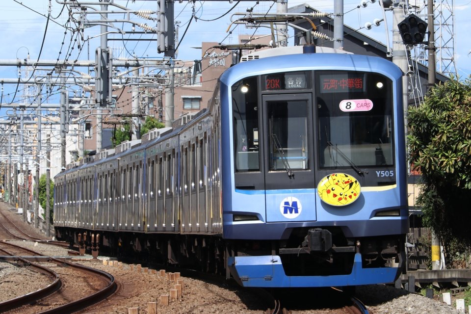 横浜高速鉄道Y500系Y515F(ピカチュウHM) 各停元町・中華街行き